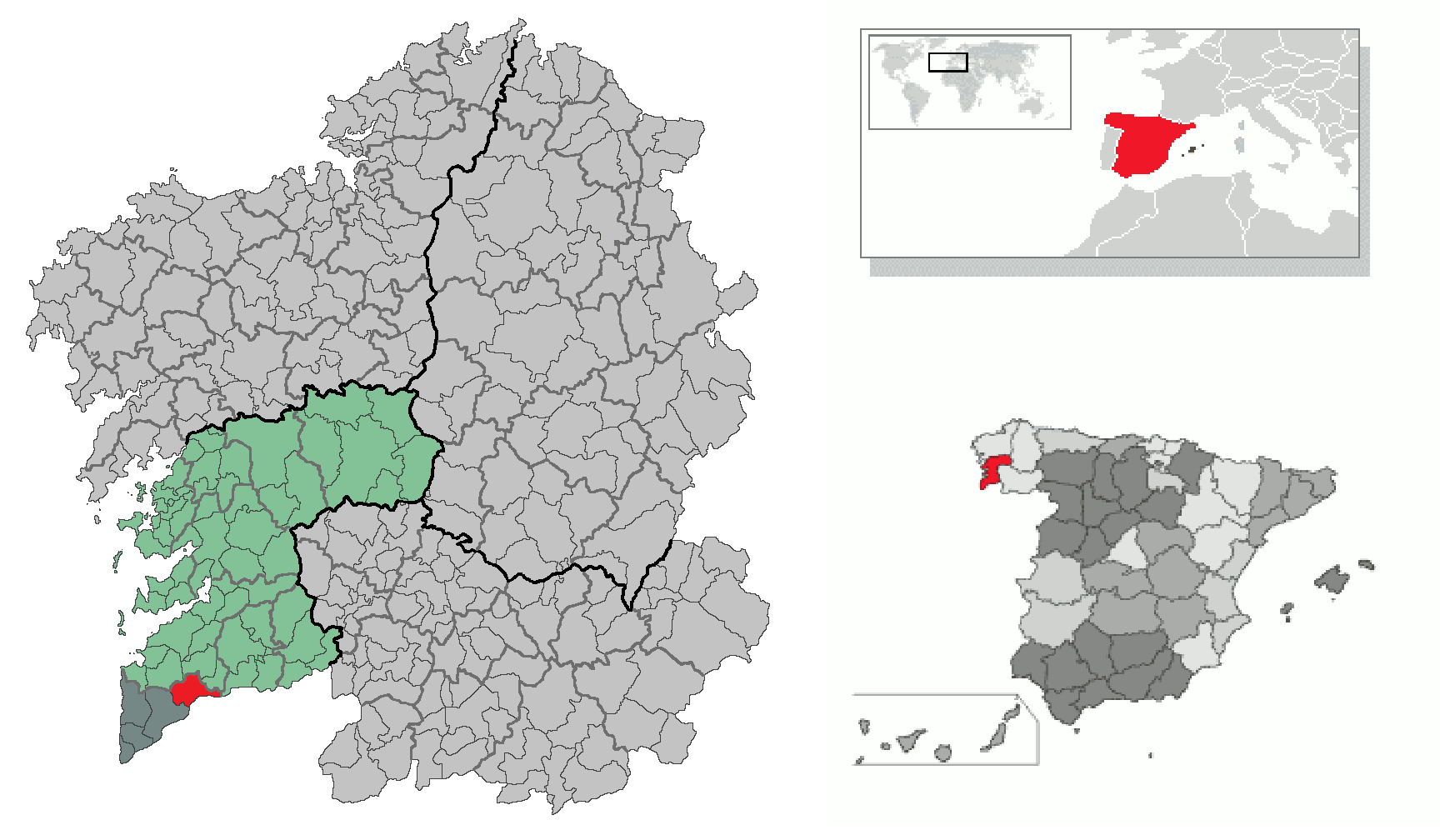 Municipio de Tui respecto a la provincia de Pontevedra, al país de España y al continente de Europa